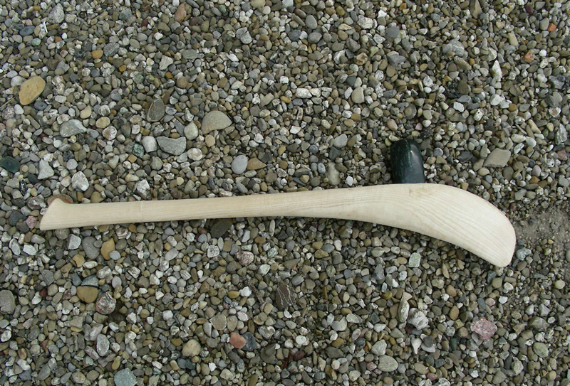 Rekonstruktion eines pfynzeitlichen Steinbeiles